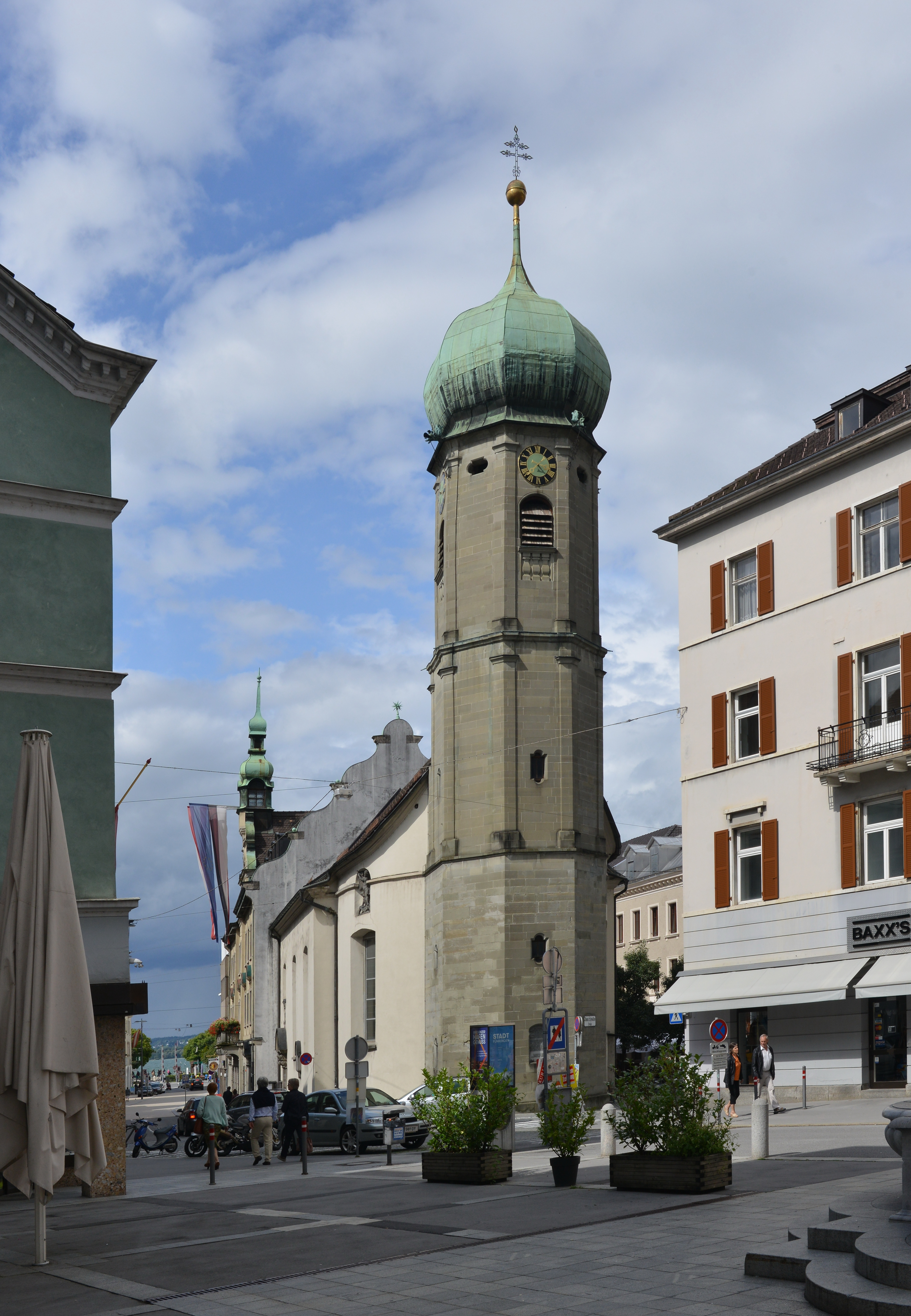 Die Seekapelle an der Rathausstraße in Bregenz wurde 1445 zum Gedenken an den Sieg über die Appenzeller (1408) errichtet und 1698/99 nach den Plänen von Christian Thumb durch Kaspar Held im Barockstil an das Bregenzer Rathaus angebaut. Die Seekapelle besitzt einen bemerkenswerten Renaissance-Hochaltar von Esaias Gruber aus dem Jahre 1615, der ursprünglich in der Schlosskapelle des Schlosses Hofen in Lochau stand.